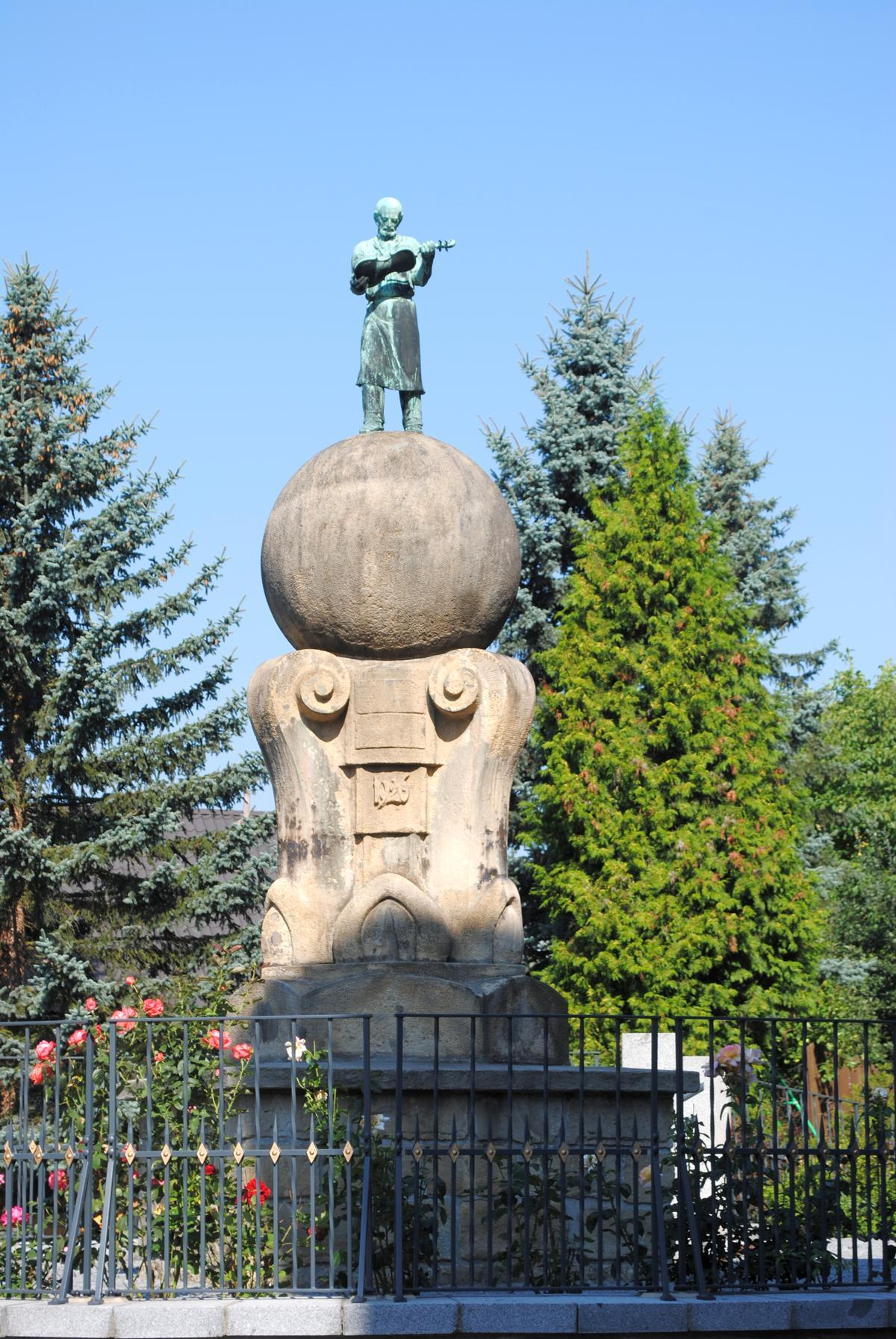 Geigenmacher-Denkmal in Luby (Tschechien), deutsch: Schönbach